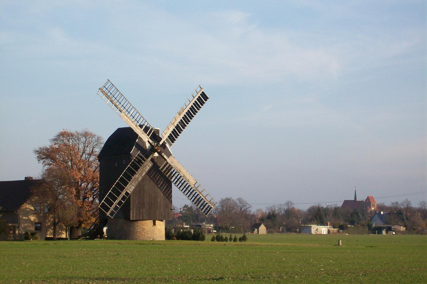 Paltrockwindmühle Brehna